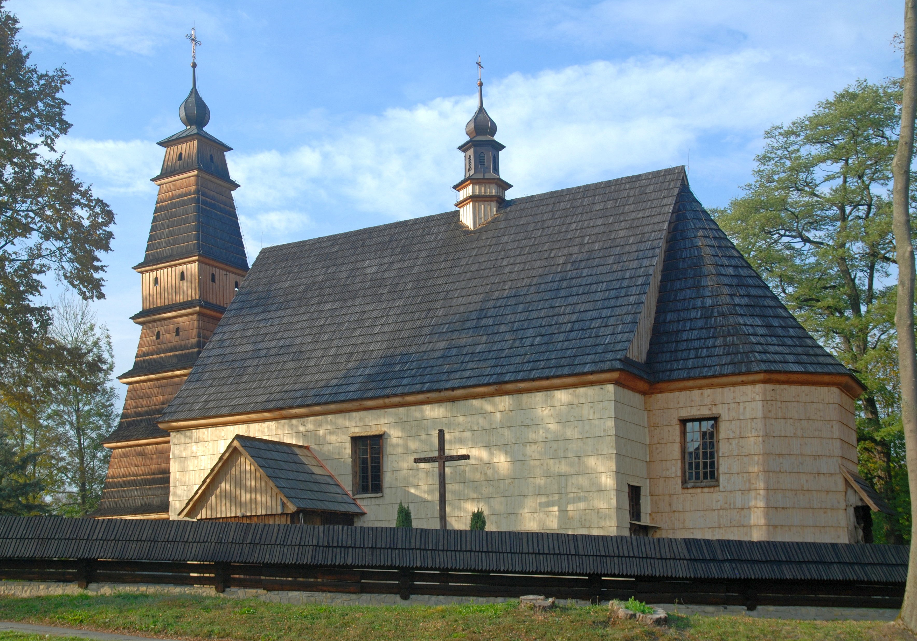 wieś Rożnowice